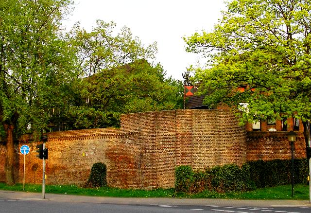 Bergheim, die in den 1980er-Jahren aufgebaute Stadtmauer mit Eckturm (Feldseite, Nord-West).